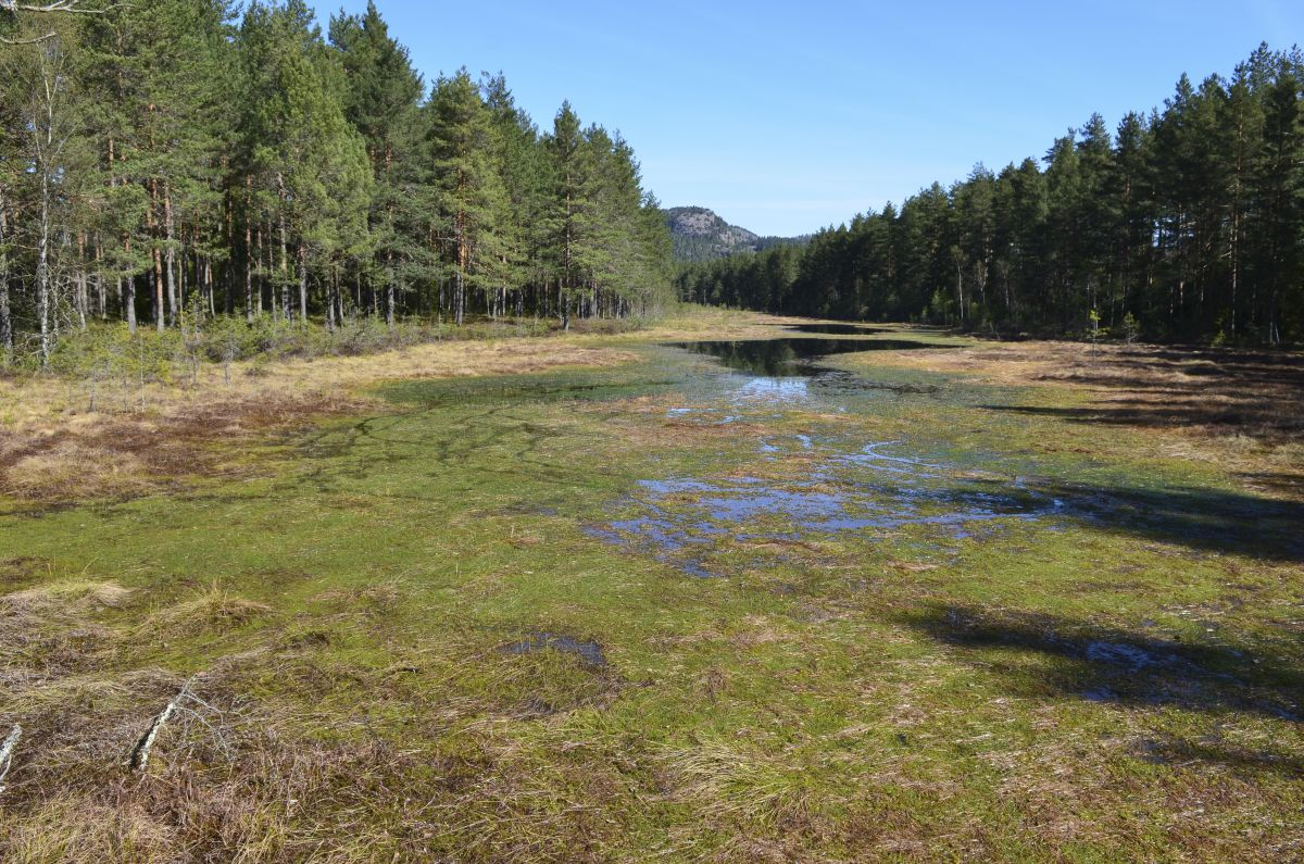 Det åpne vannspeilet i Kringlemyr er i ferd med å gro igjen.